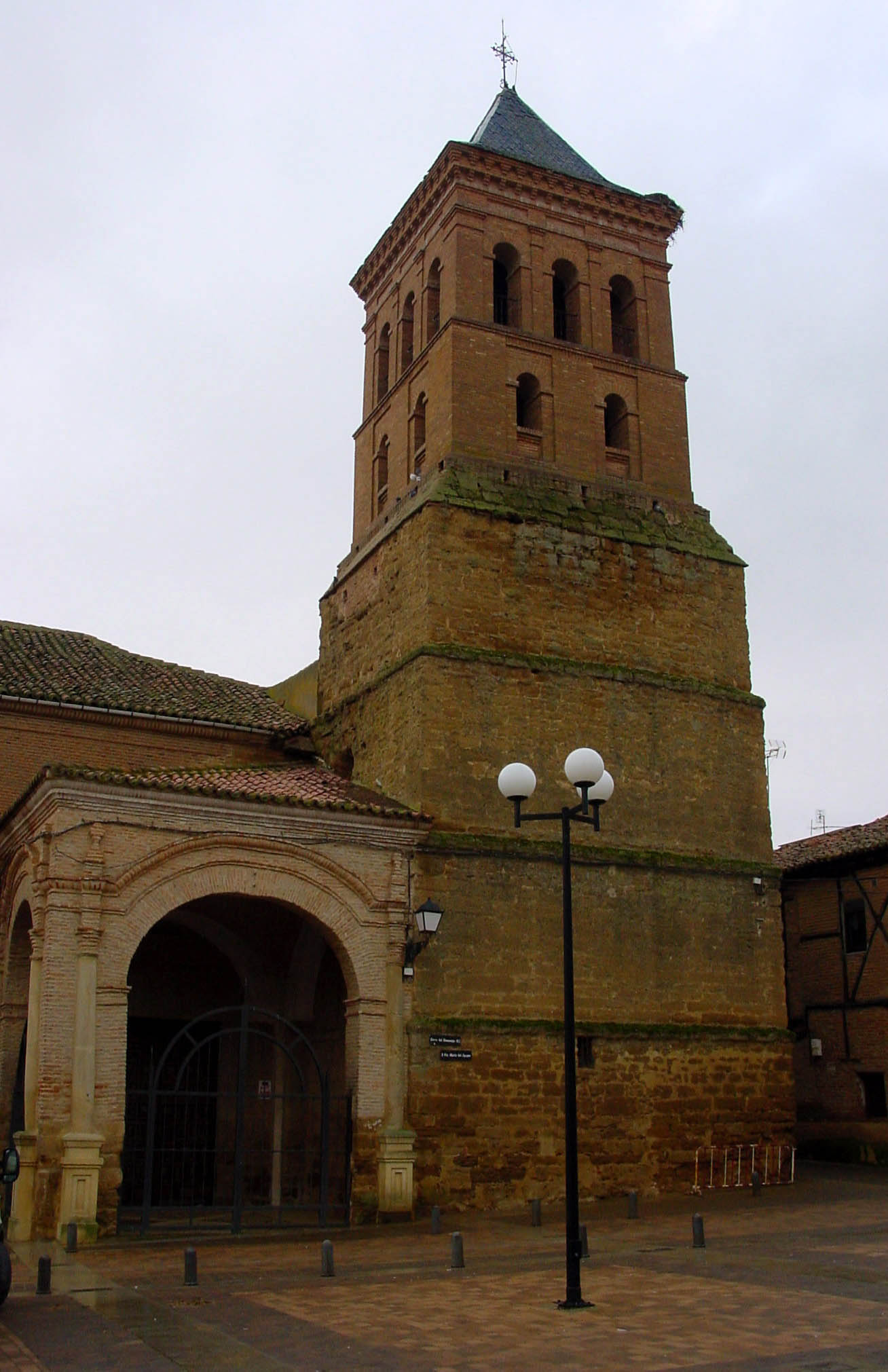 Iglesia de Santa María del Azogue en Valderas (León, España).